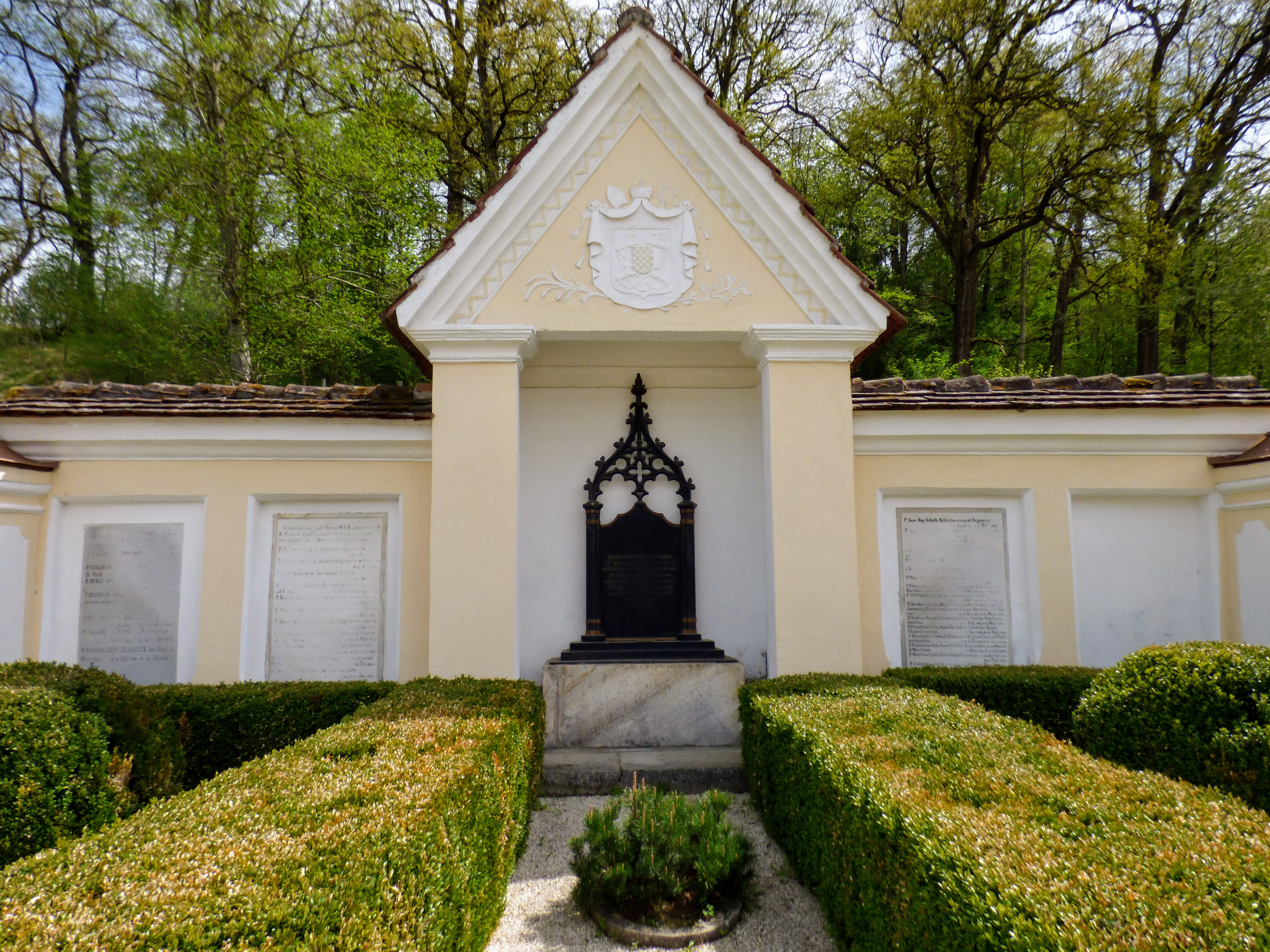 Friedhof neben der Kirche Hl. Erhard, St. Paul im Lavanttal.